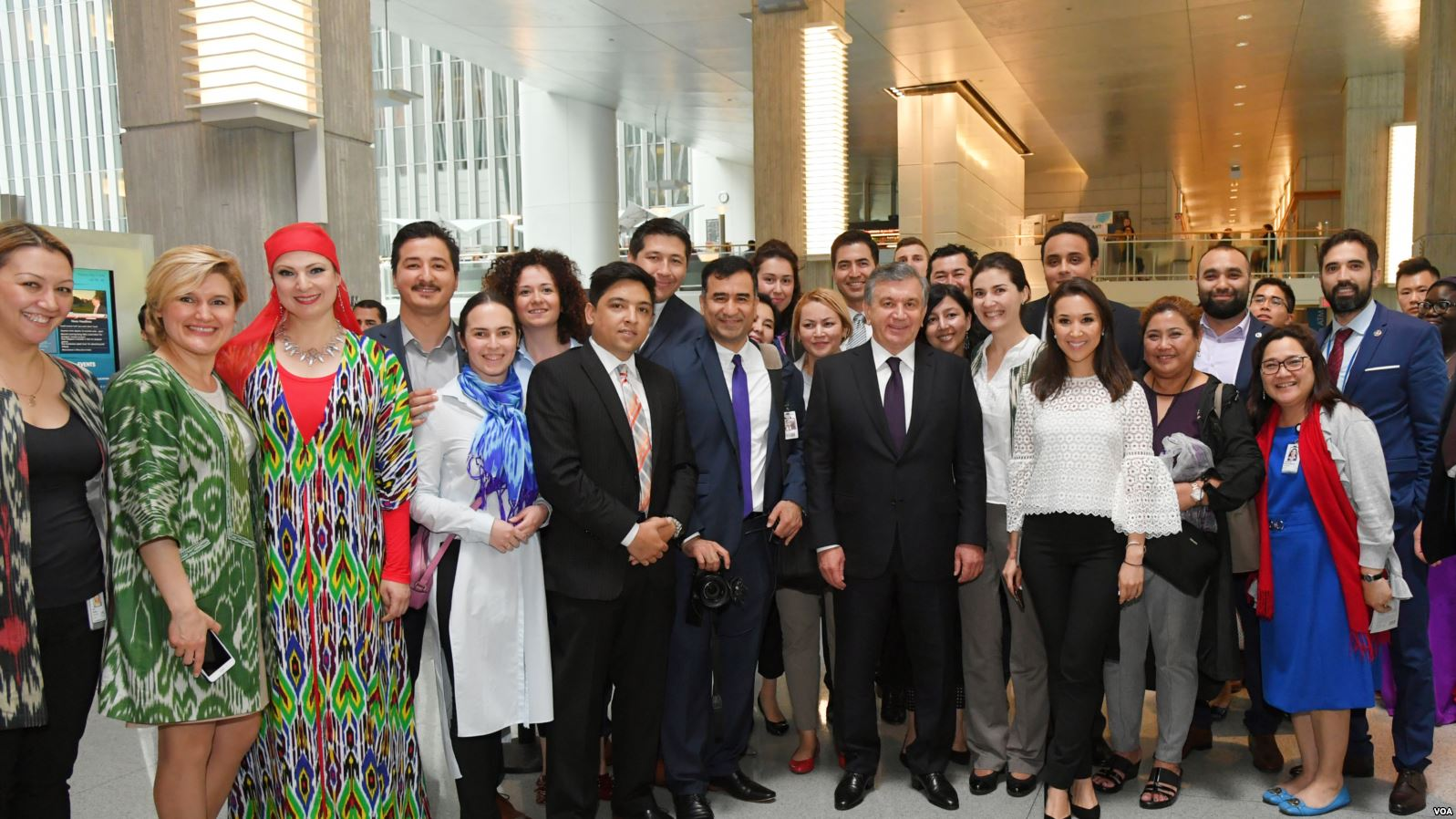 Oʻzbekcha/ўзбекча: Mirziyoyevning Jahon bankida o'zbekistonliklar bilan uchrashuvi.